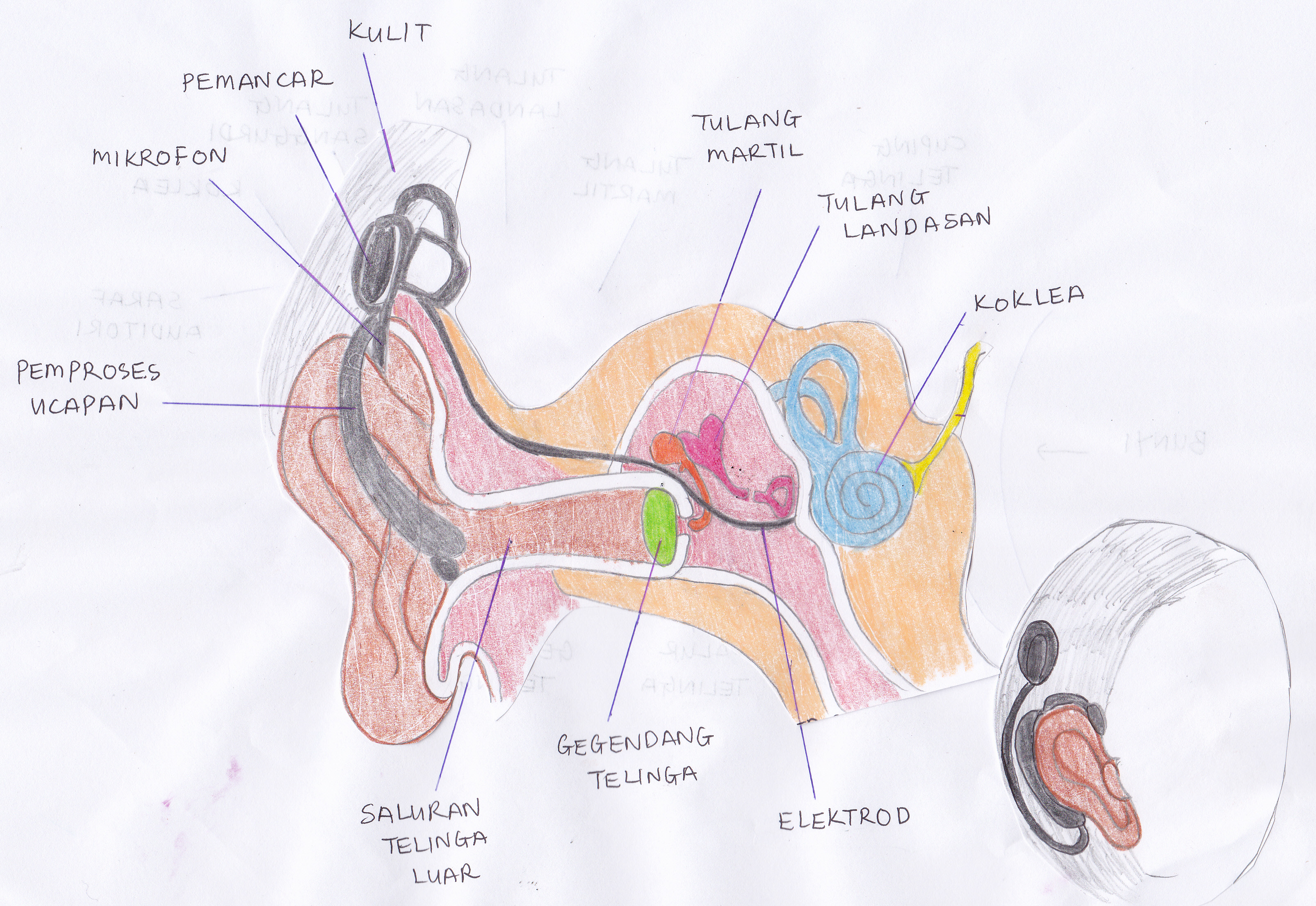 komponen implan koklea